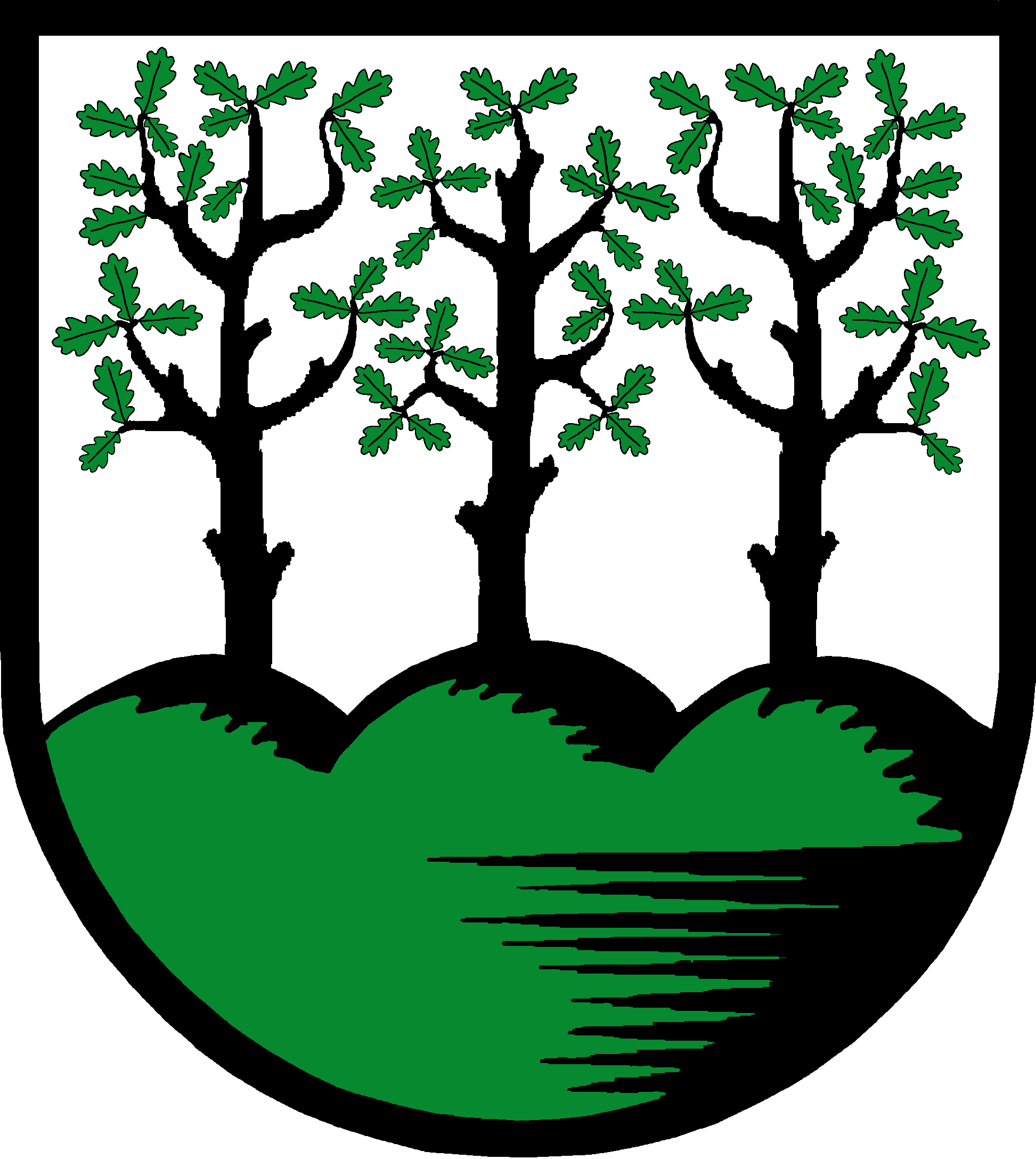 Wappen von Hamburg-Bergedorf (Stadtteil Hamburg): „Auf dem silbernen Wappenschild stehen drei Eichen auf grünem Dreiberg“.